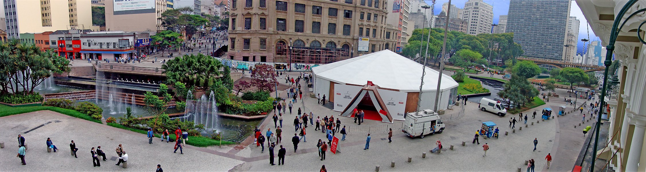 Visão panorâmica do Vale do Anhangabaú, em São Paulo SP.